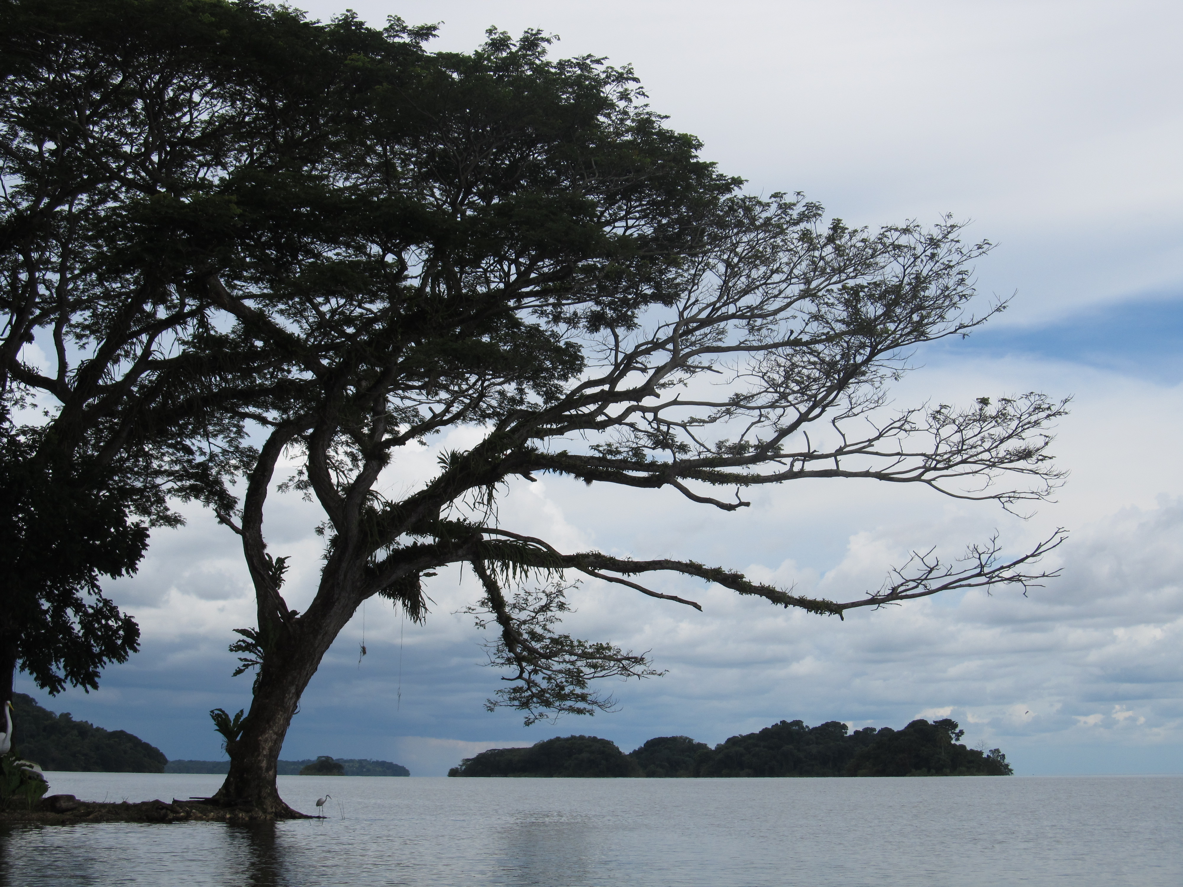 Blick auf den Nicaraguasee beim Archipel Solentiname.